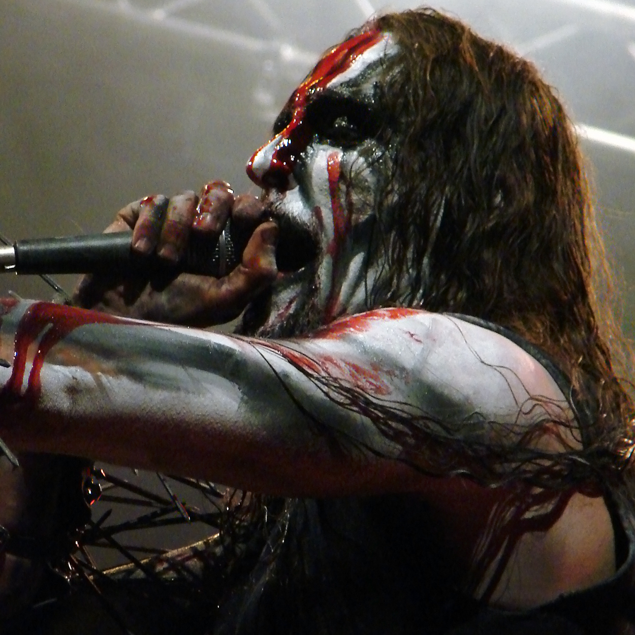 God Seed au Hellfest 2009: Gaahl.